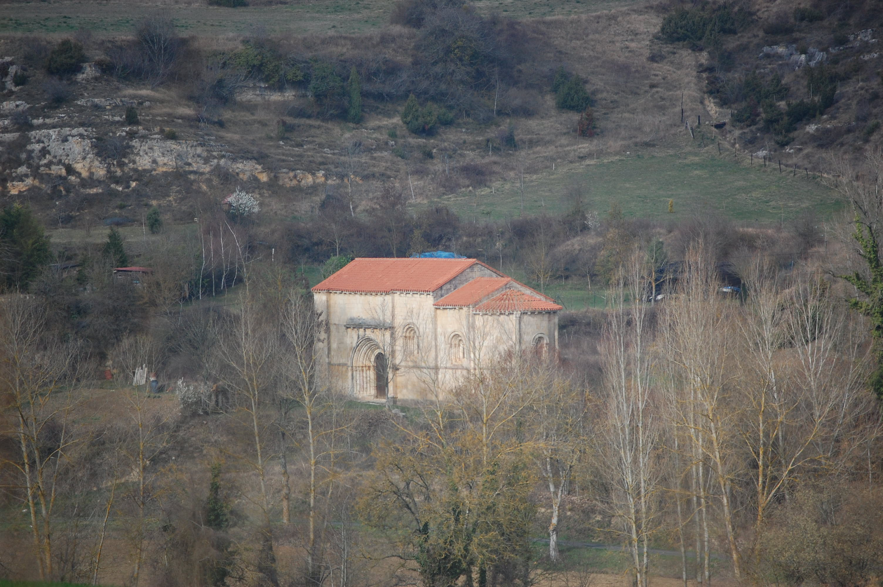 españa/pais vasco/alava/marquinez/ camino del pueblo arlucea